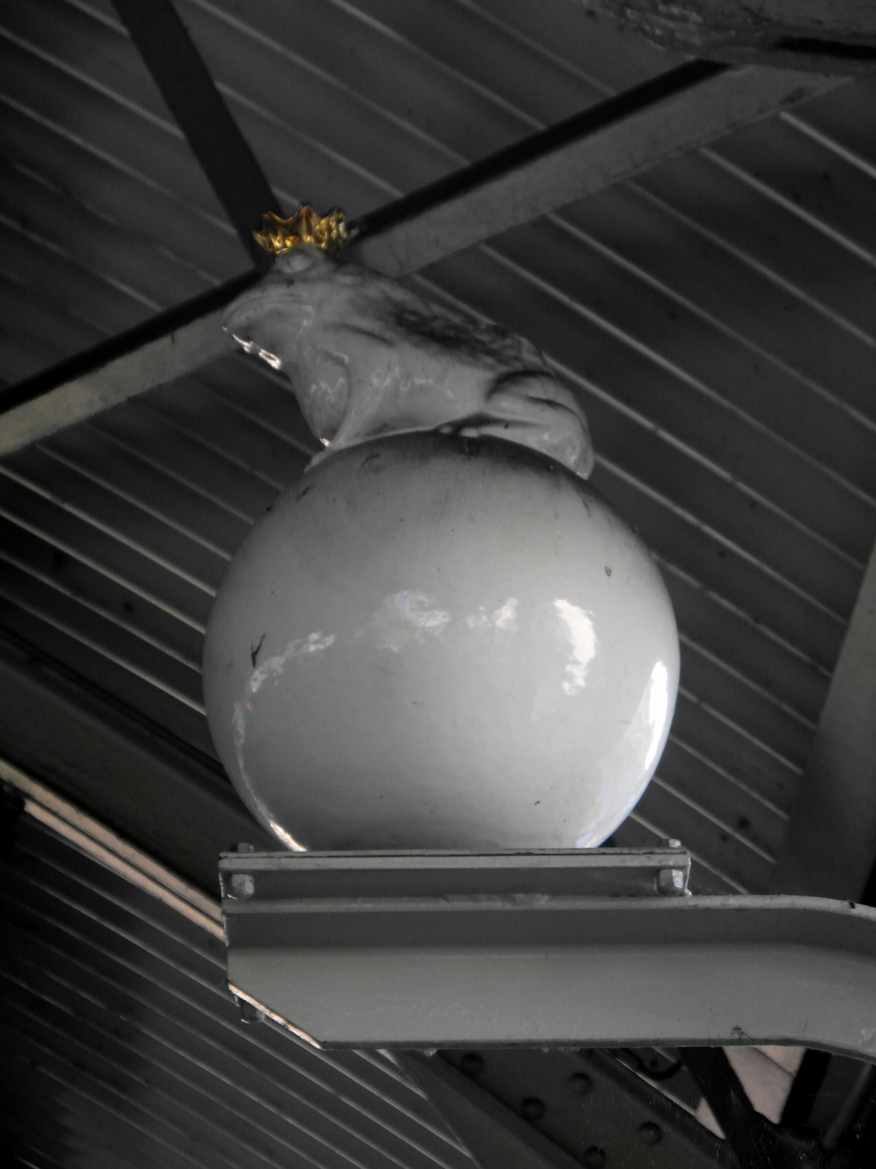 Berlin - U-Bahnhof Prinzenstraße - Linie U1